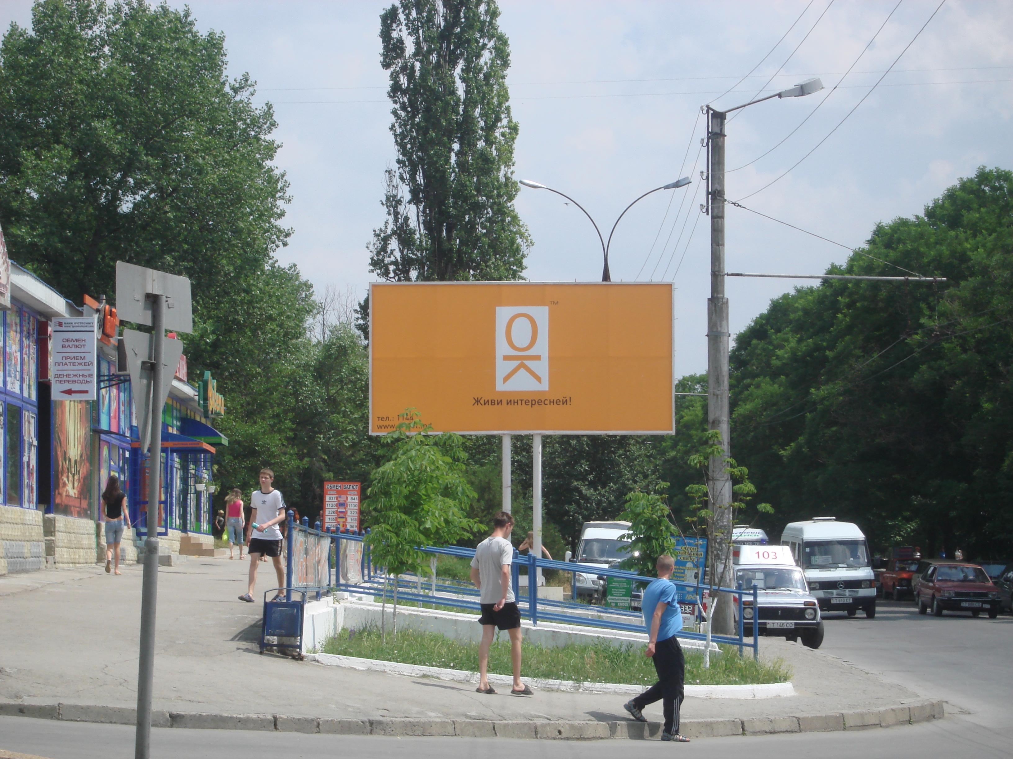 Реклама OK